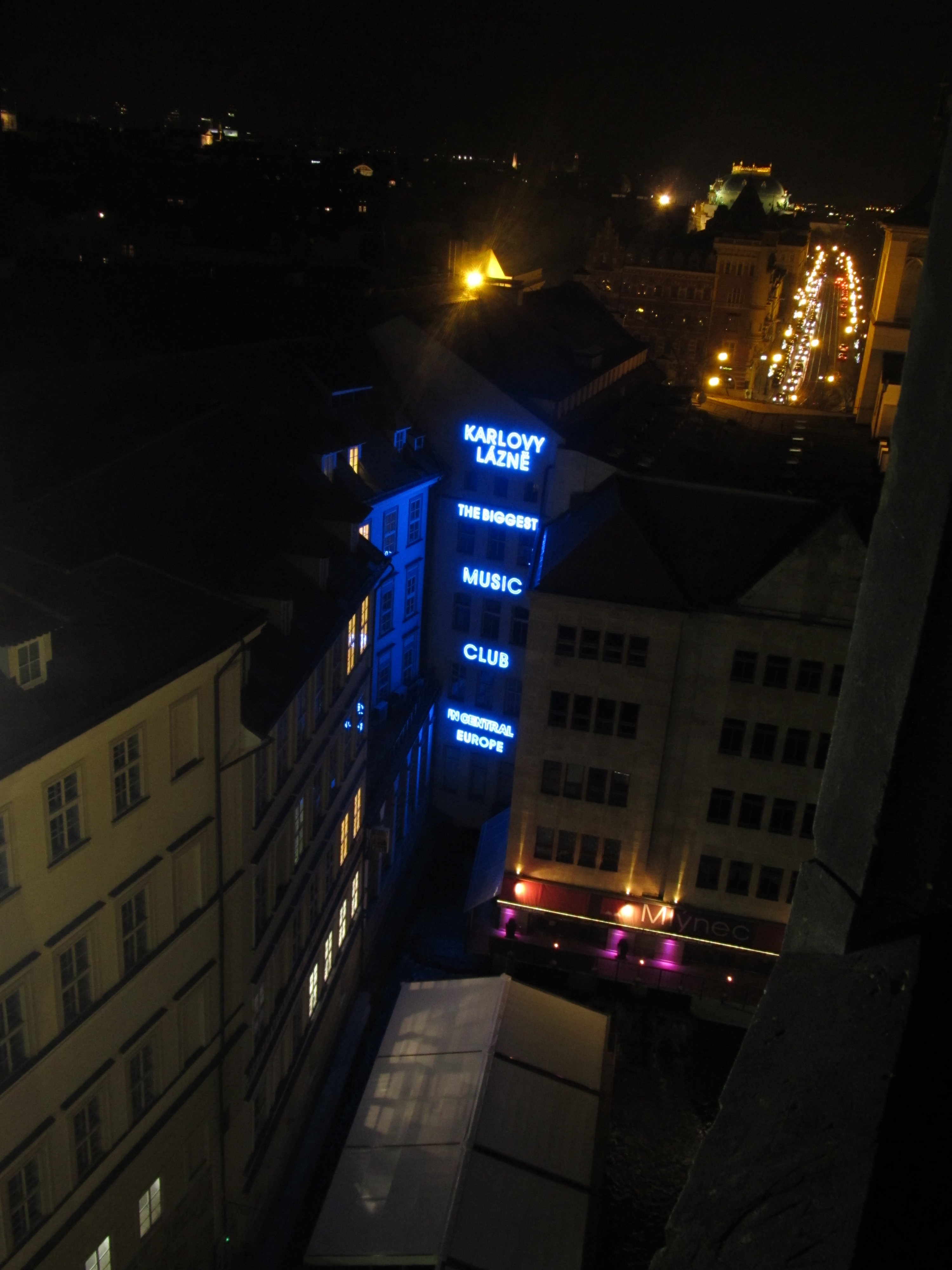 Pohled se Staroměstské mostecké věže na bývalé staroměstské mlýny a Smetanovo nábřeží.